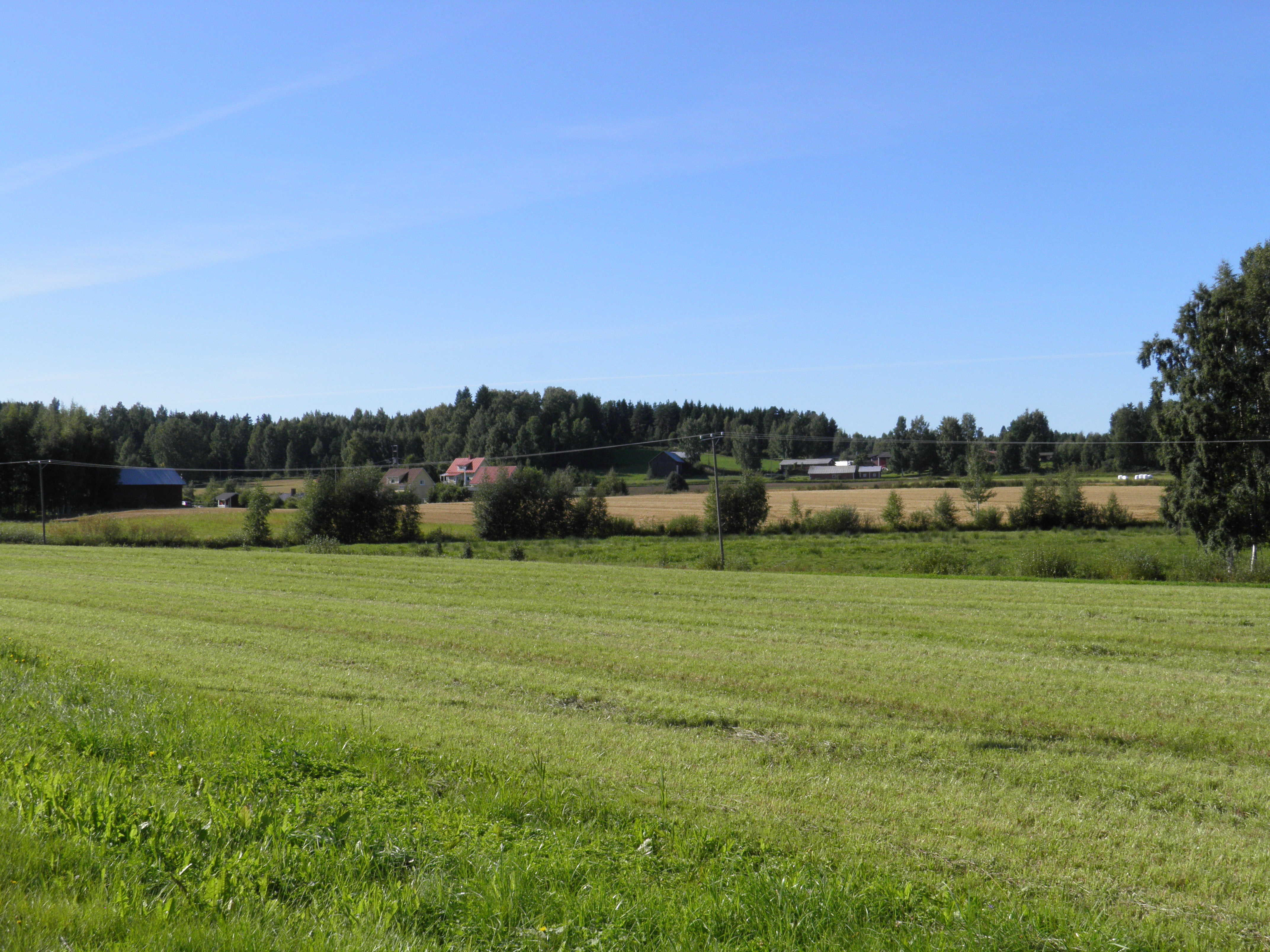 Hillilän kylää Asikkalassa.